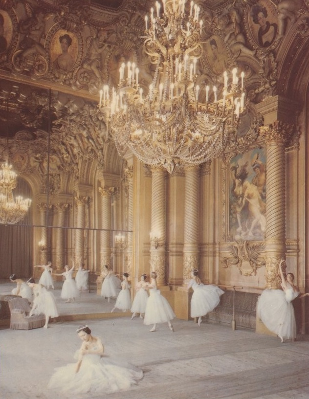 Le foyer de la danse - Nord-Est